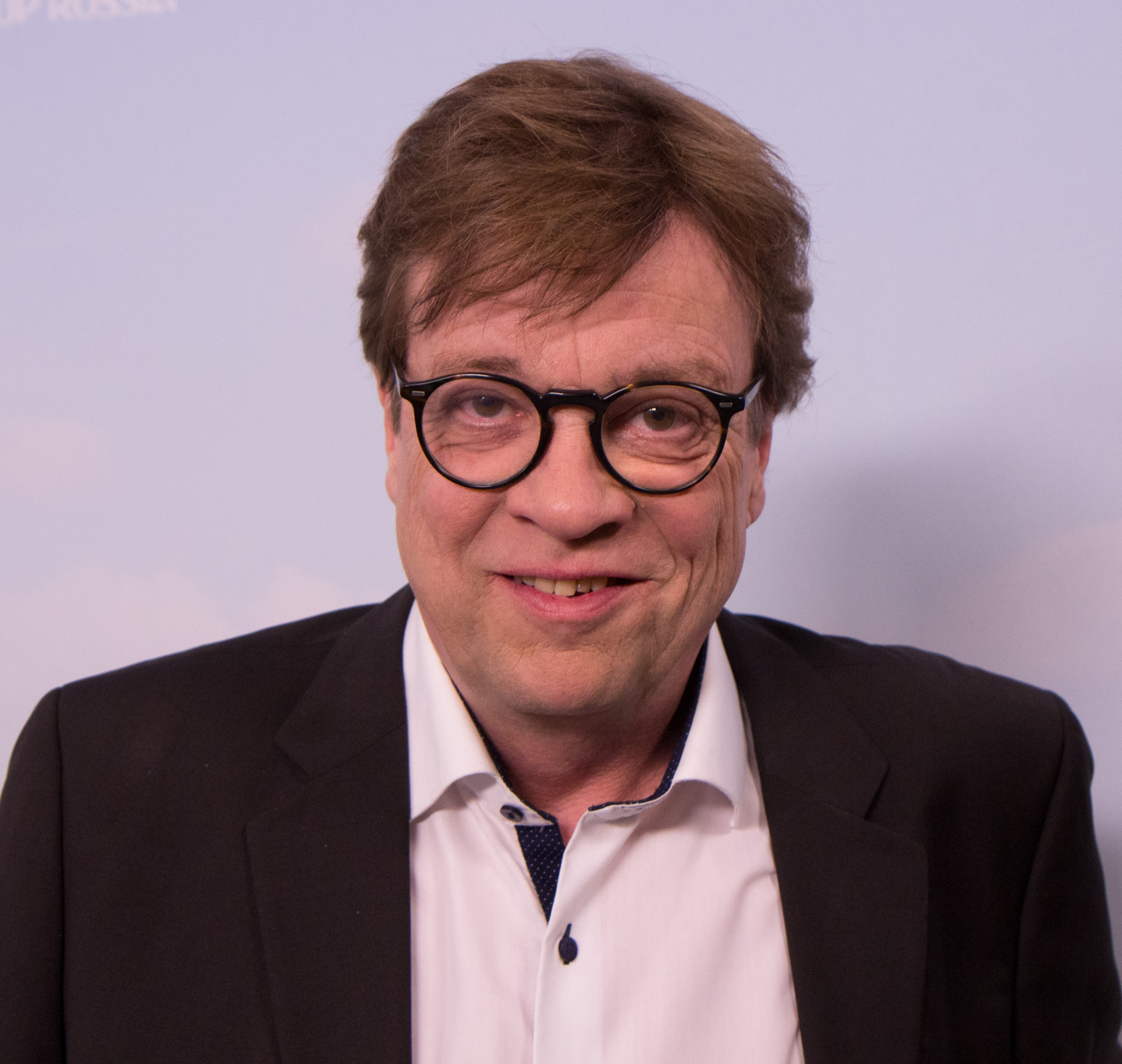 FIFA WM 2018 Pressevorstellung von ARD und ZDF in Hamburg: Béla Réthy